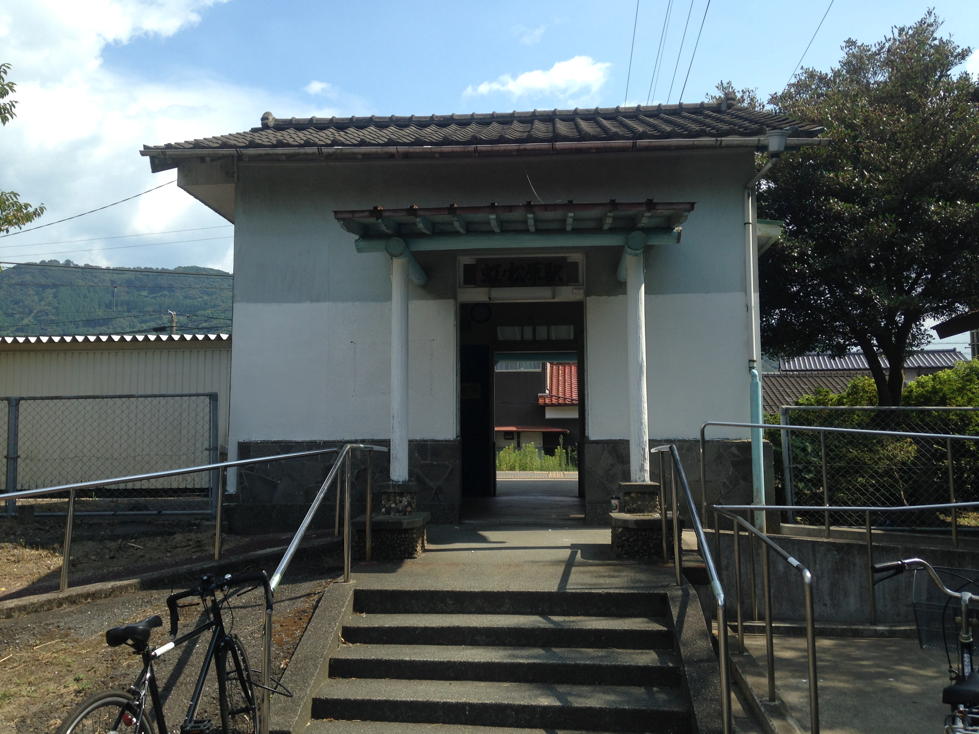 虹ノ松原駅駅舎